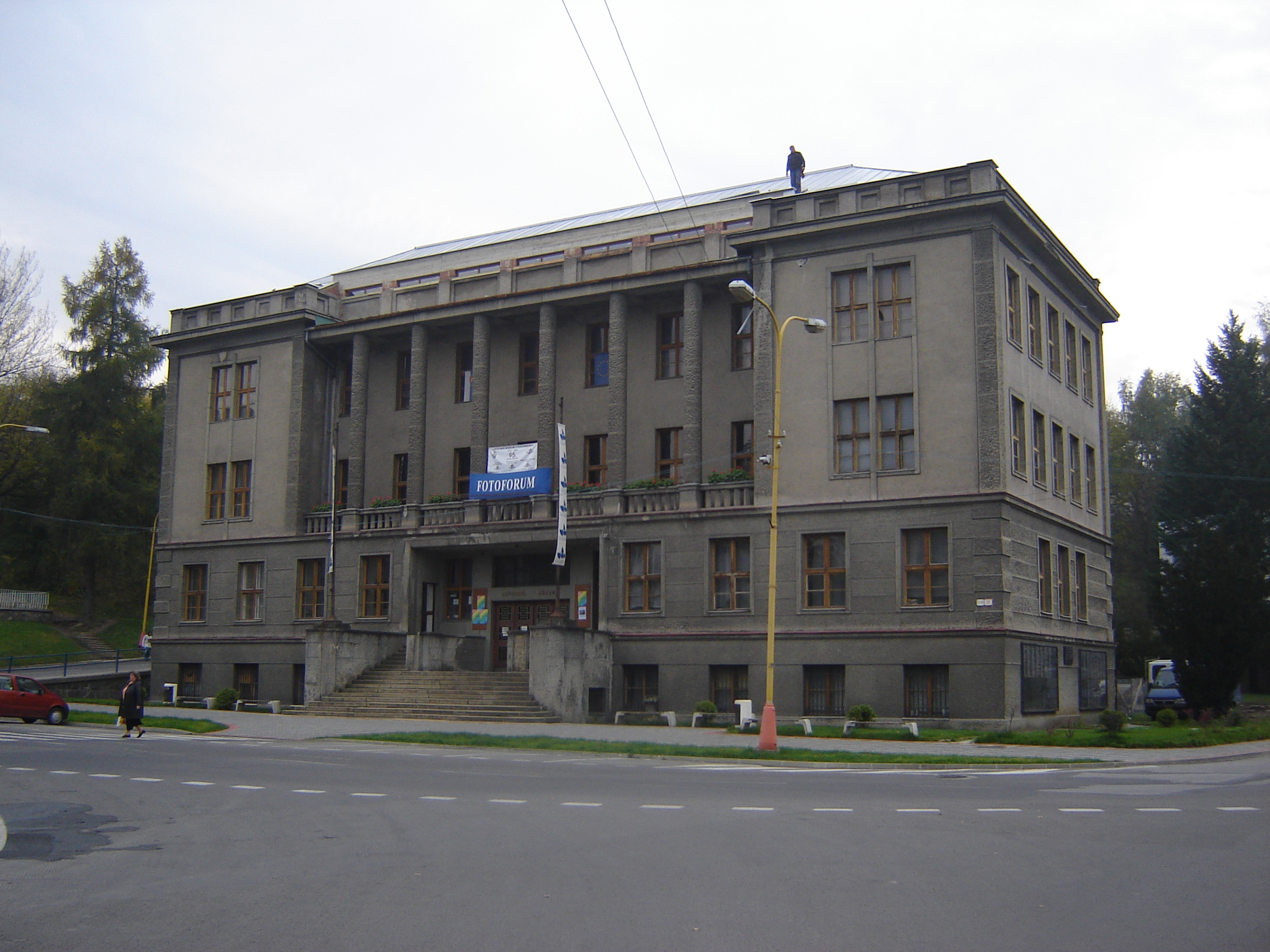 Liptovské múzeum